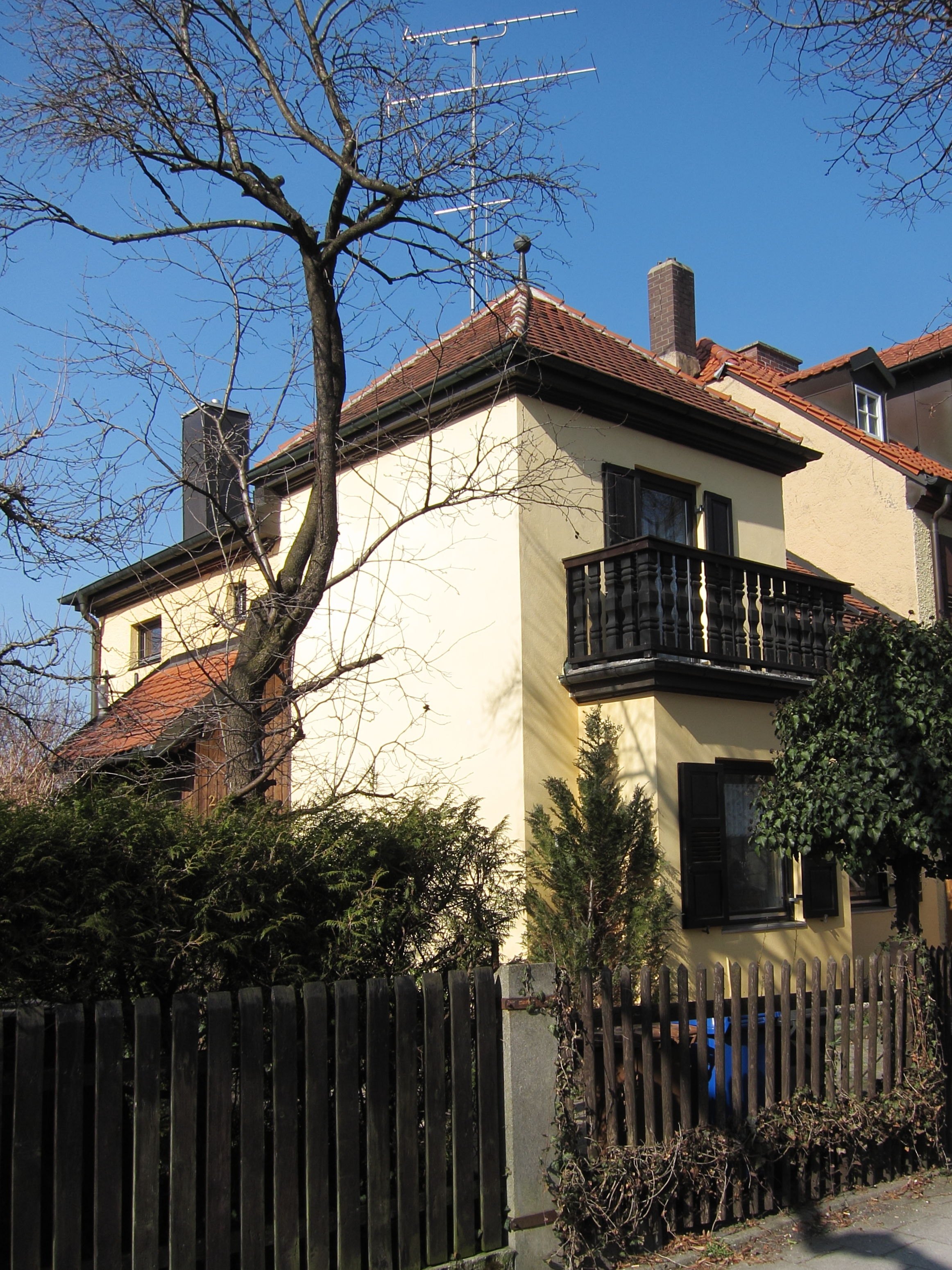 August-Exter-Straße 23; Malerische Kleinvilla, um 1895 aus dem Büro August Exter.